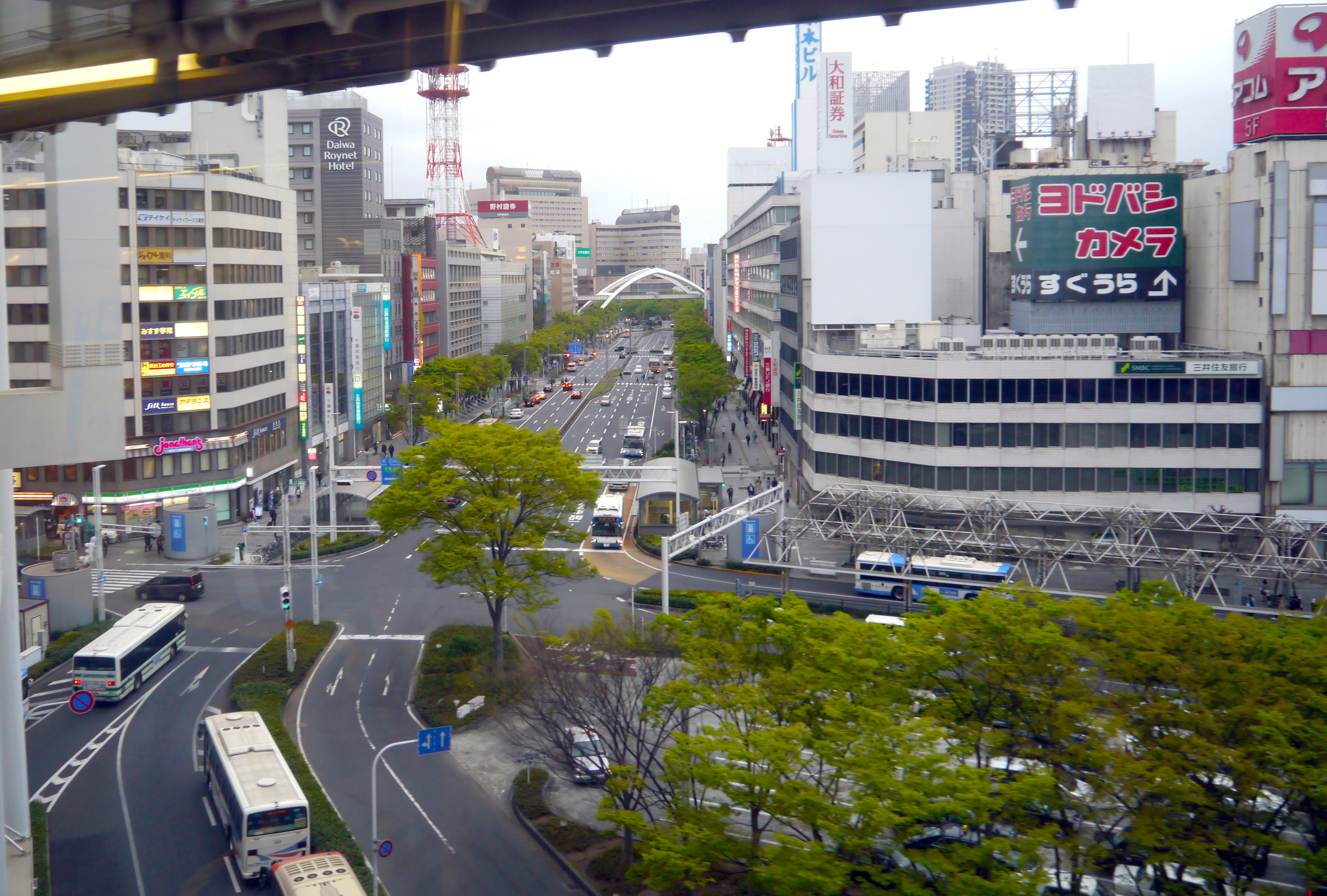 千葉都市モノレール千葉駅入口